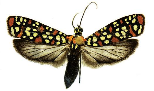 Phalaena Tinea punctella Stoll (= A. pustulella Fabricius), specimen USNCNCLEP00056027 (USNM)